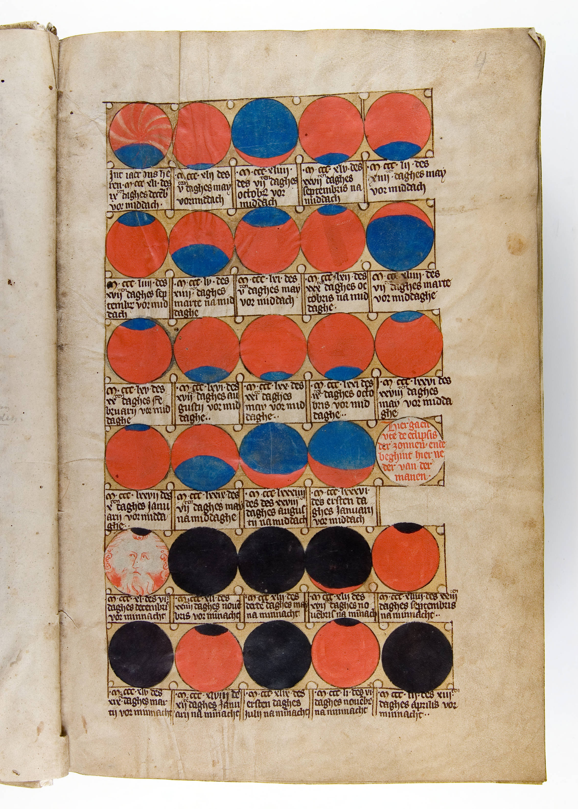 Afbeelding van zonsverduisteringen, fol. 4r